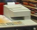 IBM 4610 POS Printer